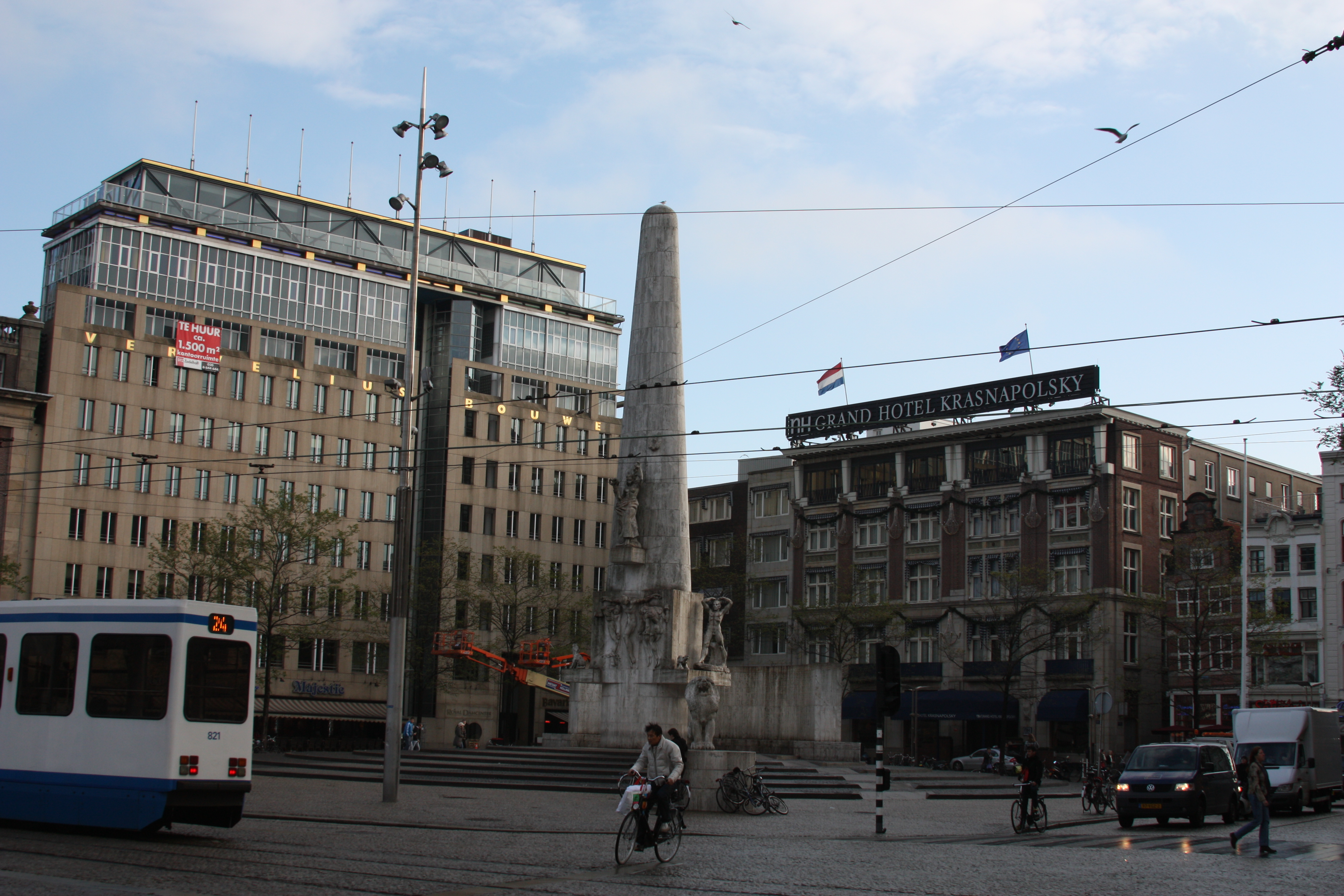 Amsterdam Zentrum